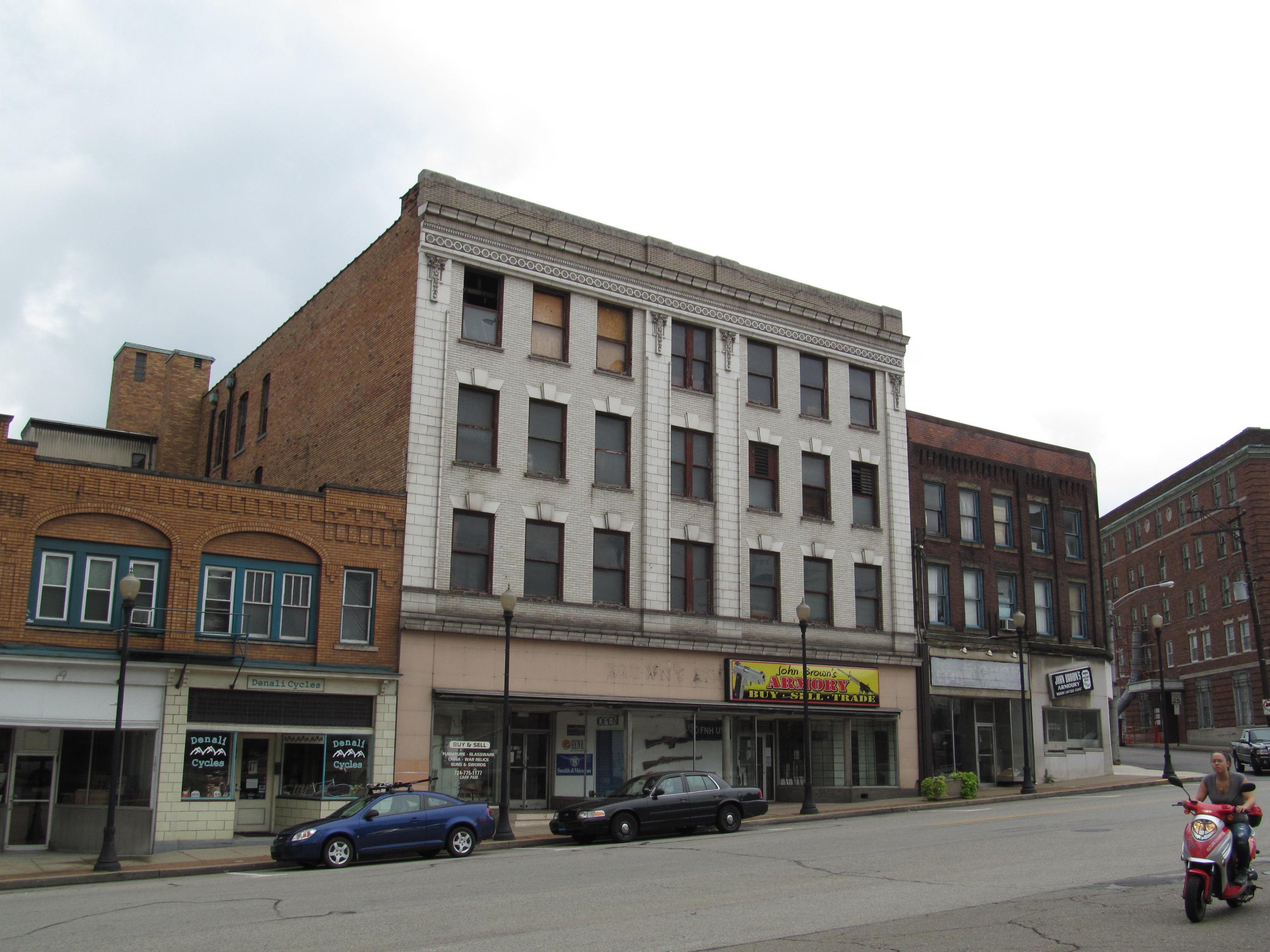 Rochester, Pennsylvania